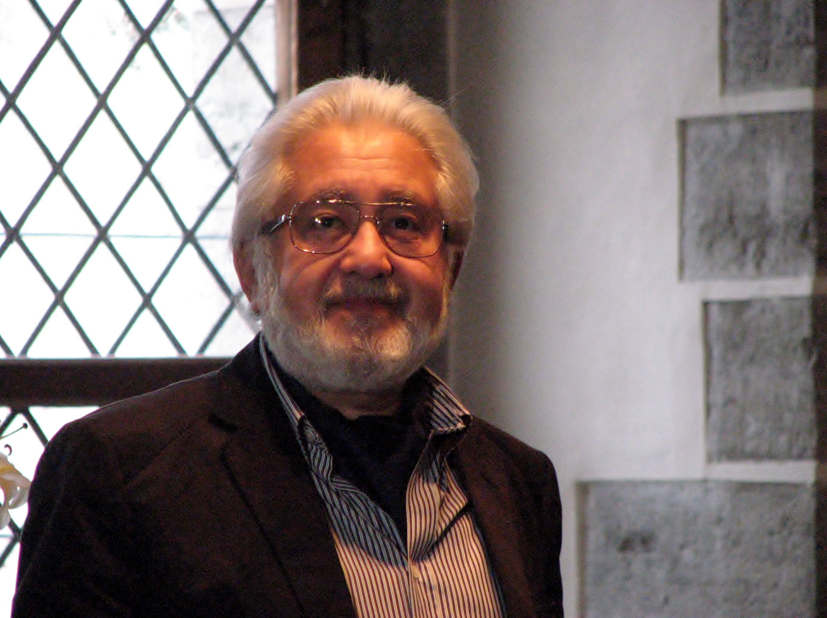 Lev Dodin esinemas Tallinna raekojas teatrifestivali "Kuldne mask" vastuvõtul